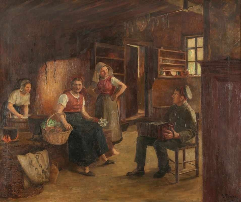 Romantisierendes Ölgemälde des Kunstmalers Carl Plinke mit einer Szene ein einem Bauernhaus betitelt „Musizierender Soldat in der Küche“ unten rechts signiert und datiert. Das Bild zeigt eine friedliche Szene in einem Bauernhaus; ein einfacher, wohl deutscher Soldat sitzt auf einem Stuhl und spielt Akkordeon, während ihm im selben Raum beschäftigte junge Bauersfrauen freundlich zugeneigt gewähren lassen. Am linken Bildrand ist ein Tuch zu sehen mit den Initialen „K P 22“ Möglicherweise die Künstlersignatur Karl Plinkes und das Jahr 1922 ... Das Gemälde wurde in Öl auf Leinwand geschaffen in den Maßen100 x 120. Das Werk wurde vom Kunst- und Auktionshaus Kastern angeboten ...